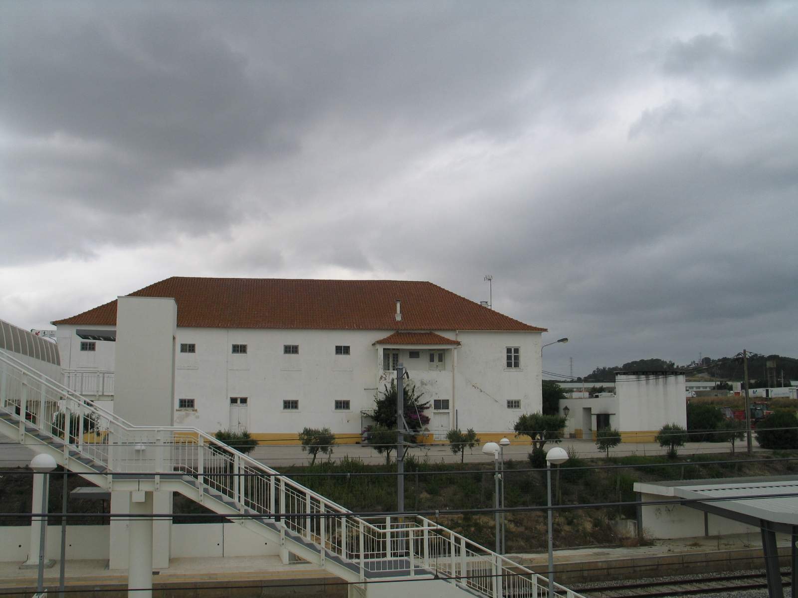 Antigo edifício sede da Escola Militar de Aviação, visto do apeadeiro ferroviário de Vila Nova da Rainha